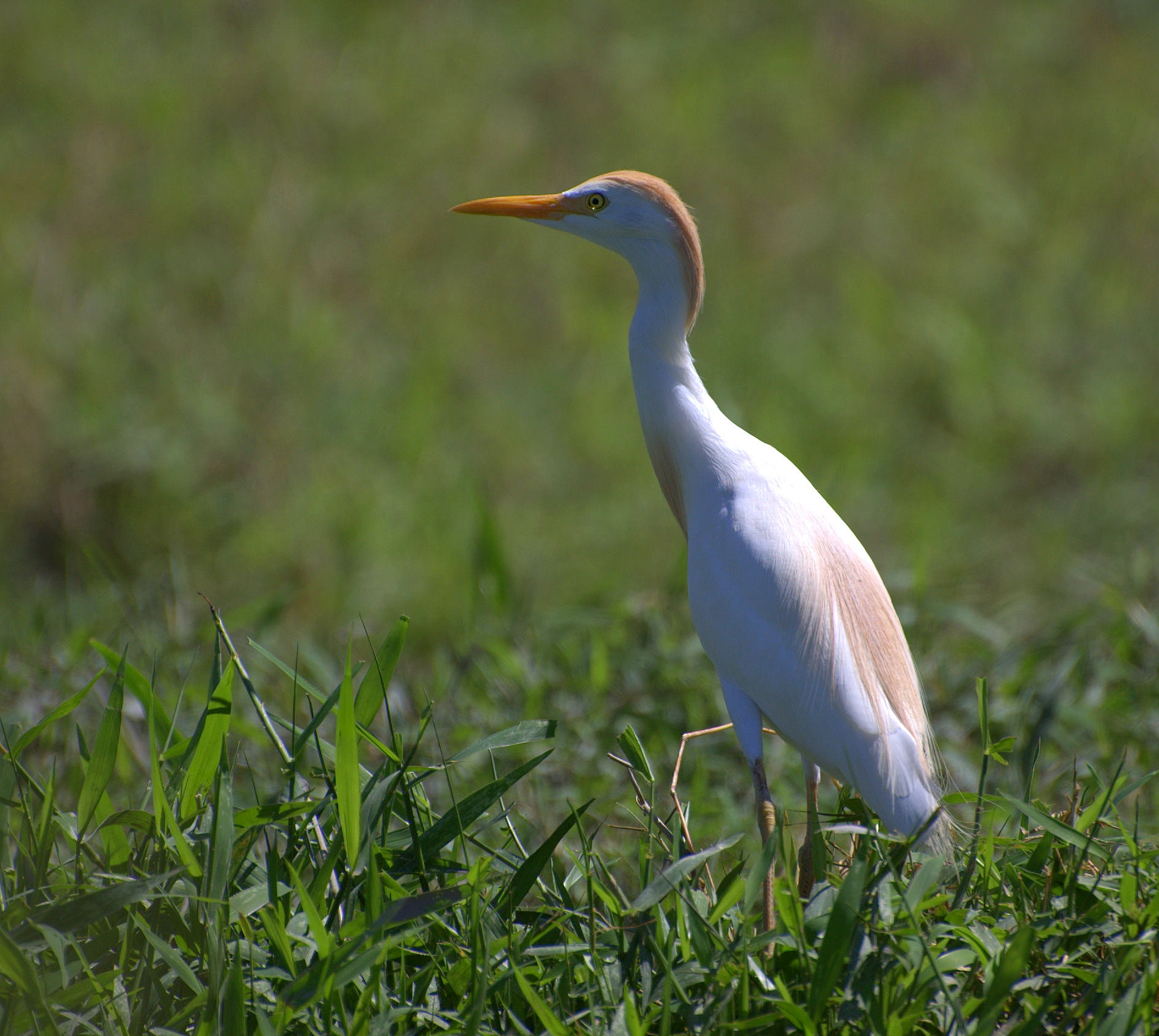 Margem do rio Ribeira de Iguape próximo à cidade de Registro